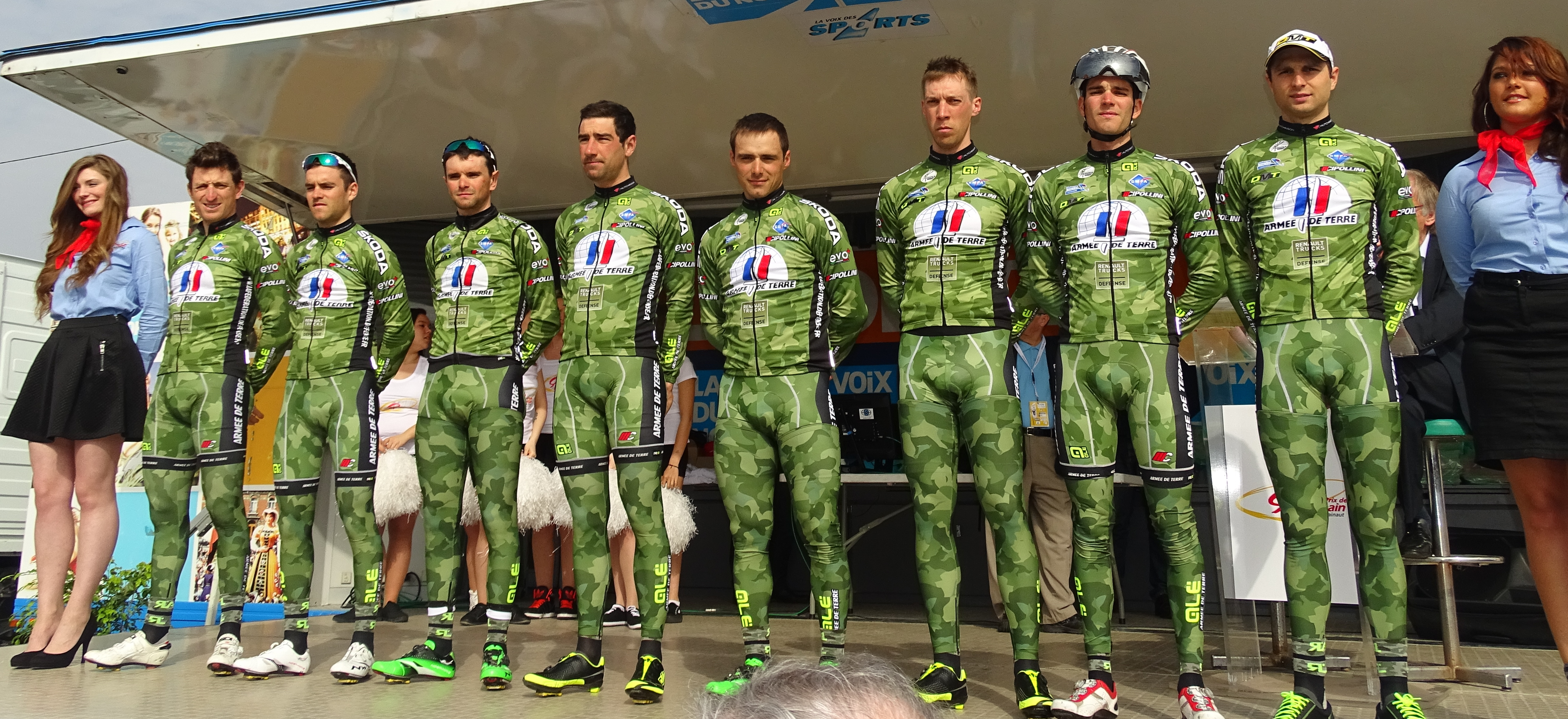 Reportage réalisé le jeudi 16 avril à l'occasion du départ et de l'arrivée du Grand Prix de Denain 2015 à Denain, Nord, Nord-Pas-de-Calais, France.